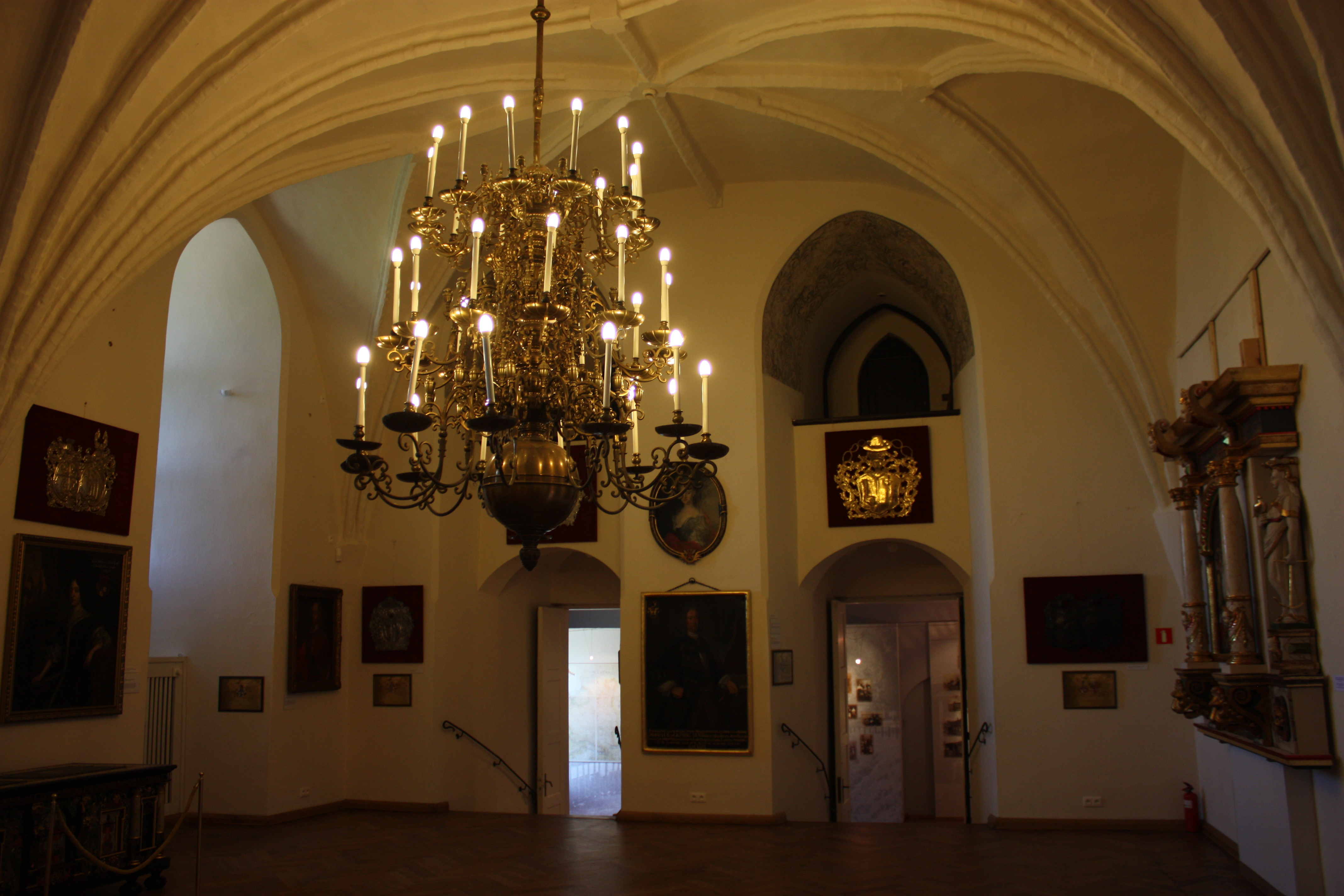 Olsztyn, zamek, ob. muzeum, XIV-XVII, XIX